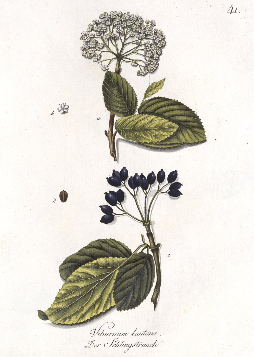 Abbildung Der Hundert Deutschen Wilden Holz-Arten Nach Dem Nummern-Verzeichnis Im Forst-Handbuch Von F. A. L. Von Burgsdorf; Tafel: Der Schlingstrauch (Viburnum Lantana) Schwalkenbeerstrauch Erklärung